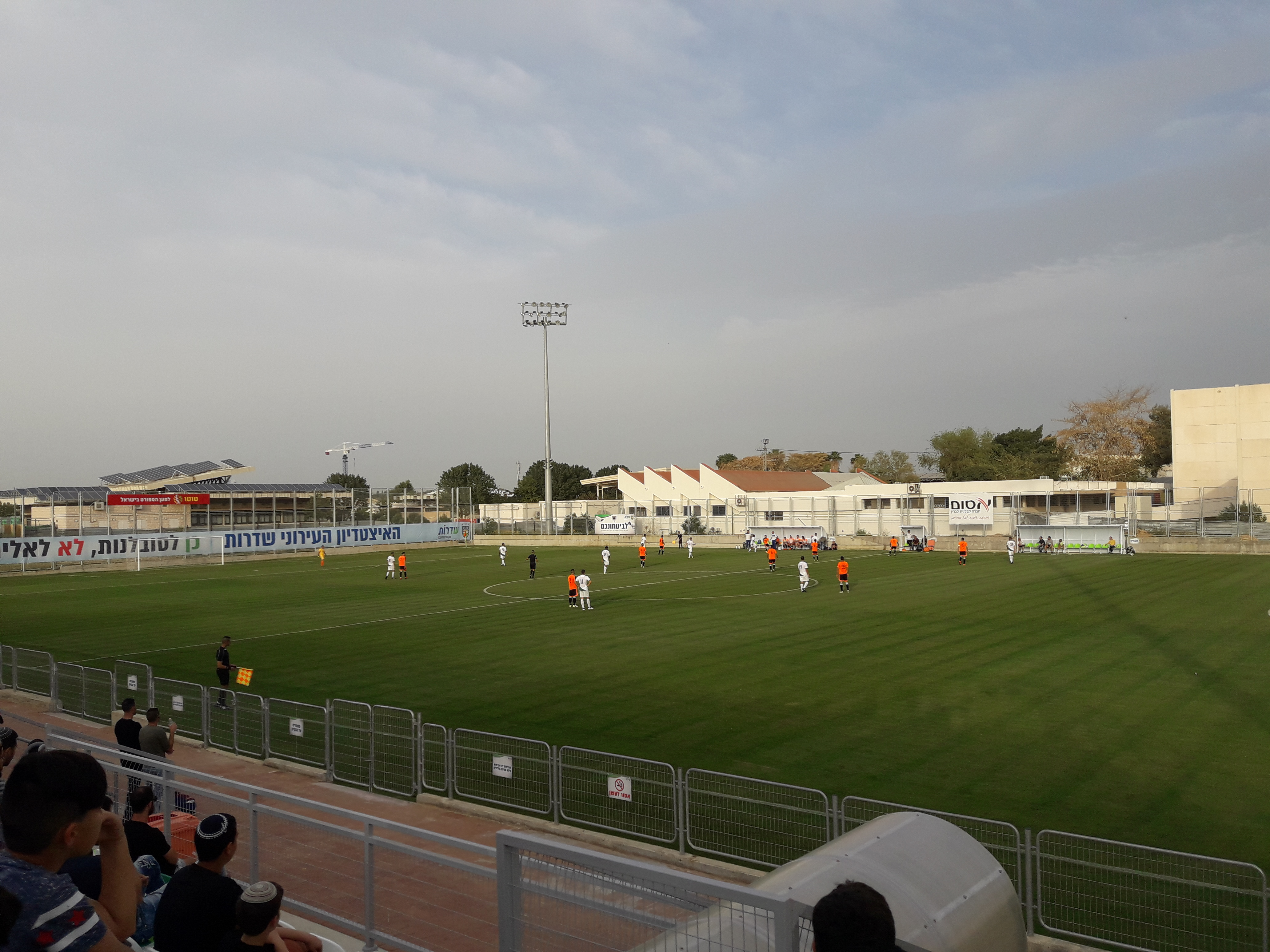 צולם במשחק הליגה הראשון של הקבוצה המקומית במגרש